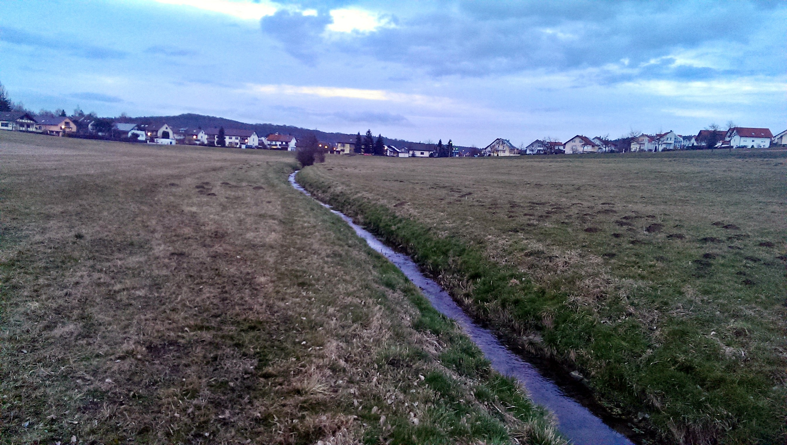 Der Tälesbach bei Althengstett, das im Hintergrund zu sehen ist.